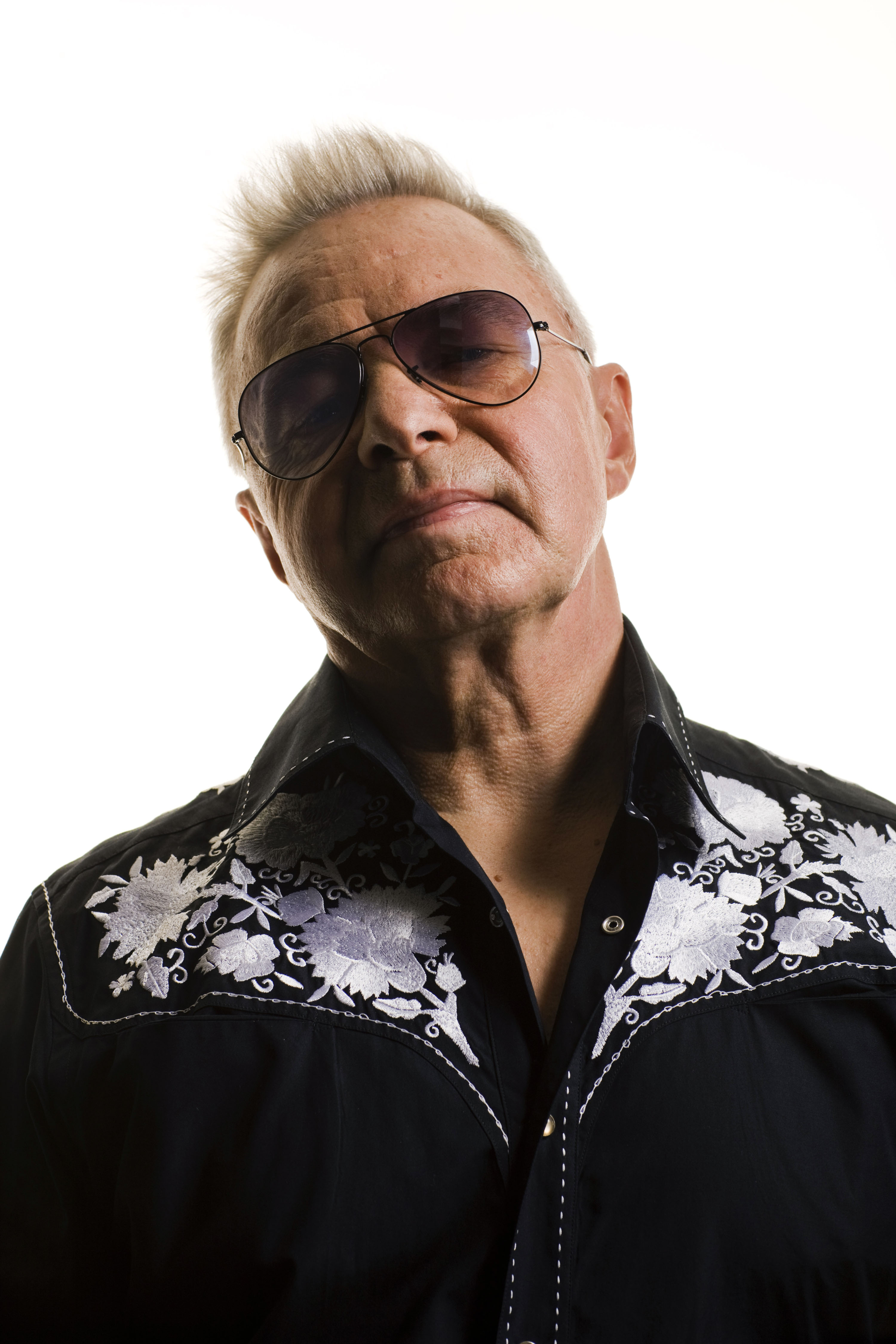 Artisten Jerry Williams.